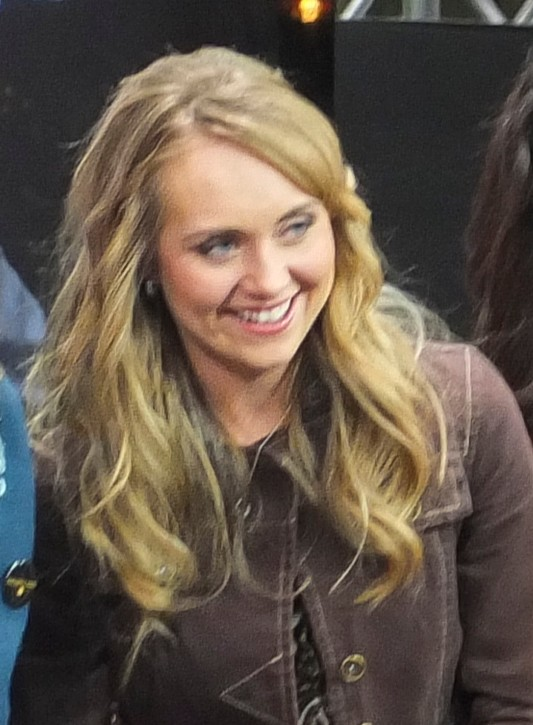 Amber Marshall en 2015.